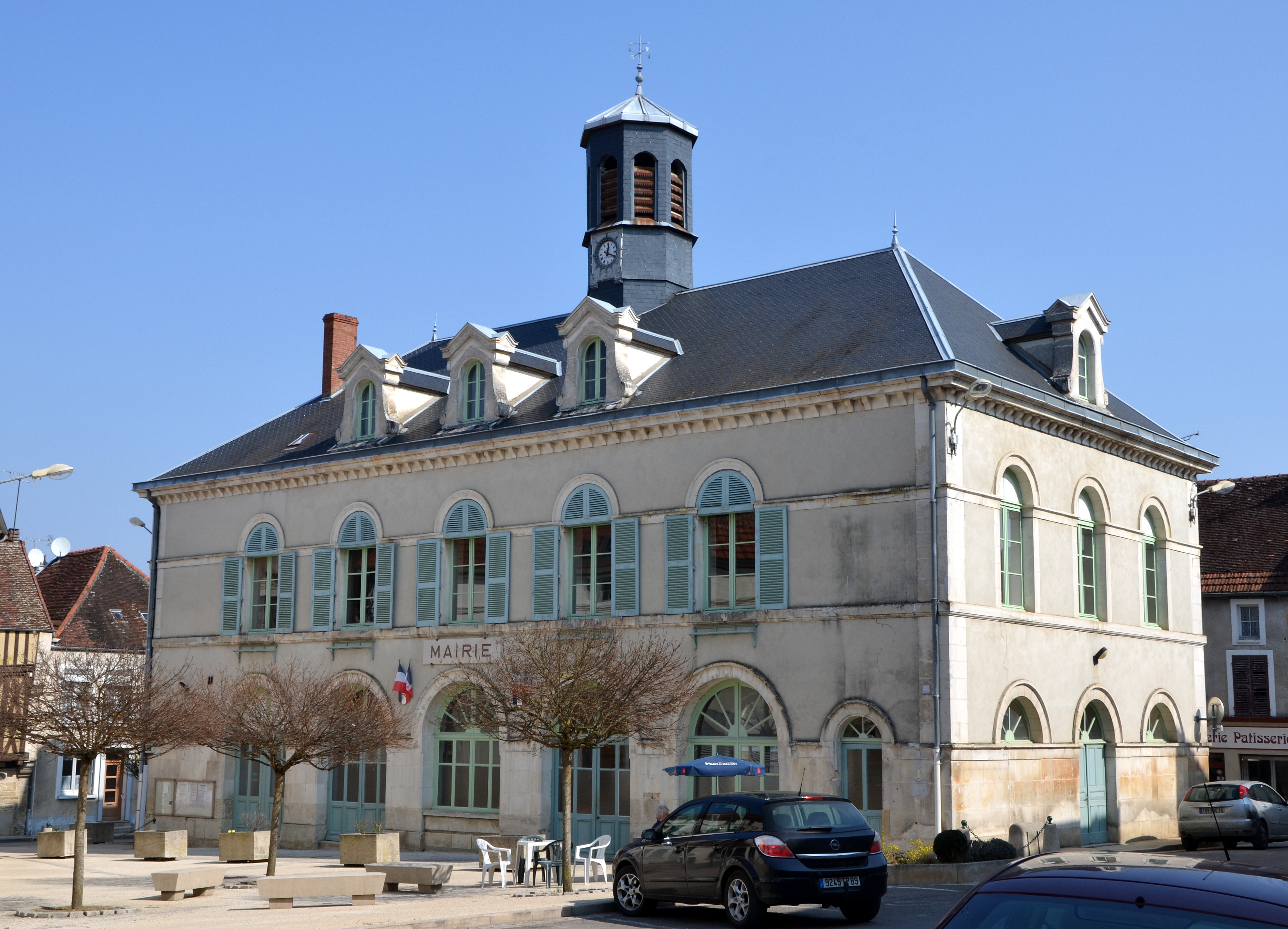 Mairie de Ravieres, Yonne, Bourgogne, France